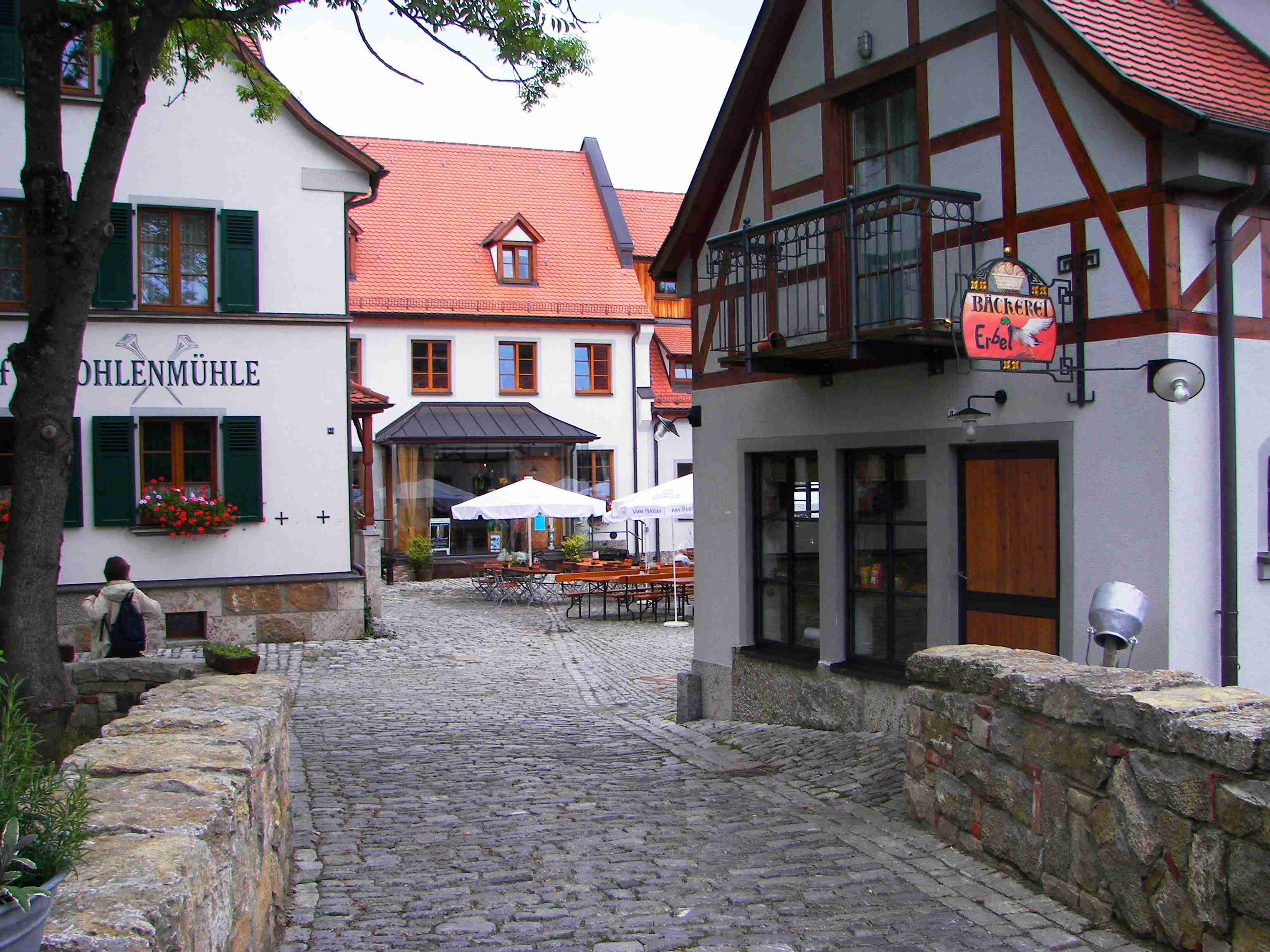 Neustadt an der Aisch, Gasthof Kohlenmühle